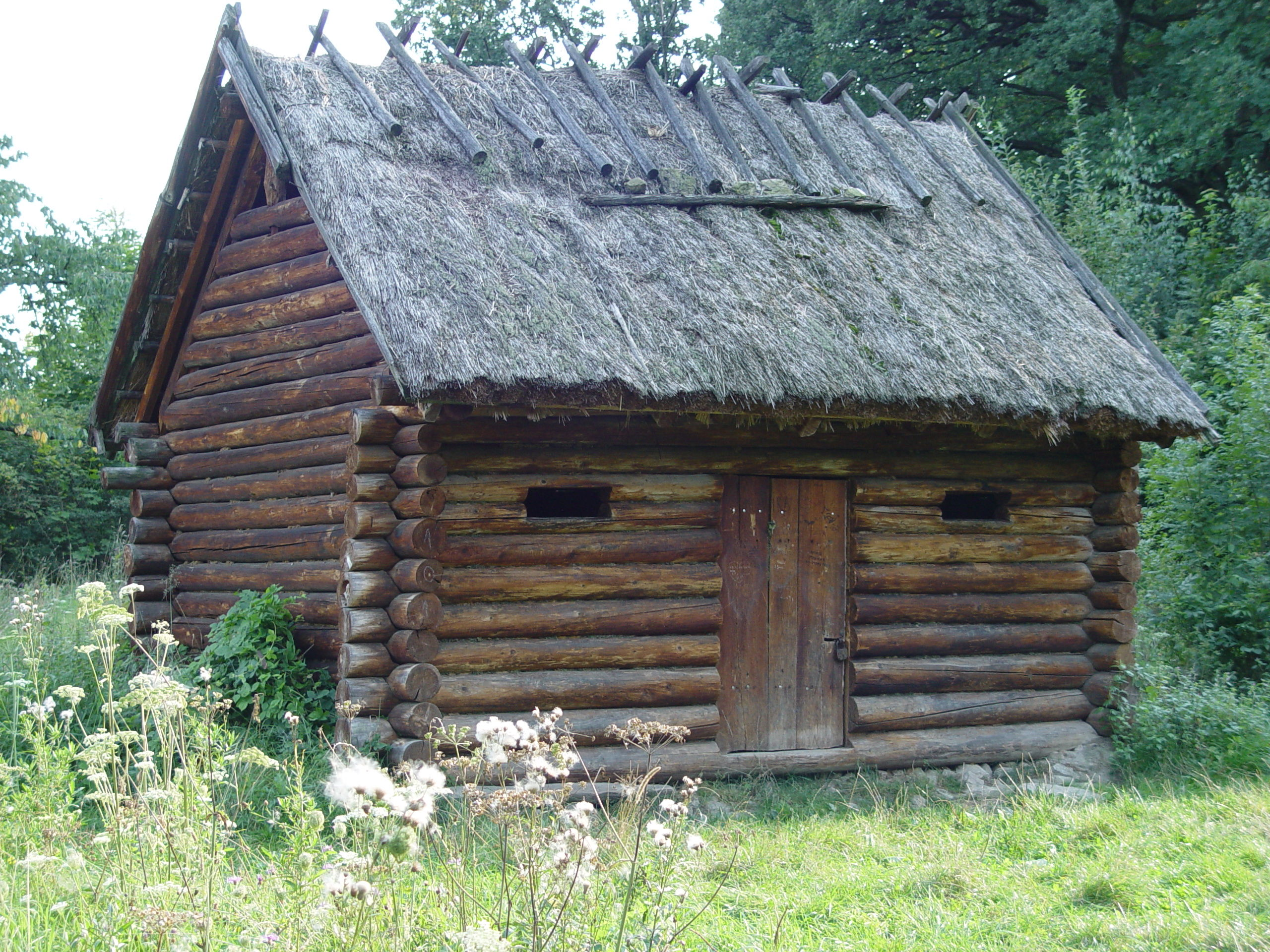 Zrekonstruowana chata w Rezerwacie Archeologicznym w Będkowicach (woj. dolnośląskie)